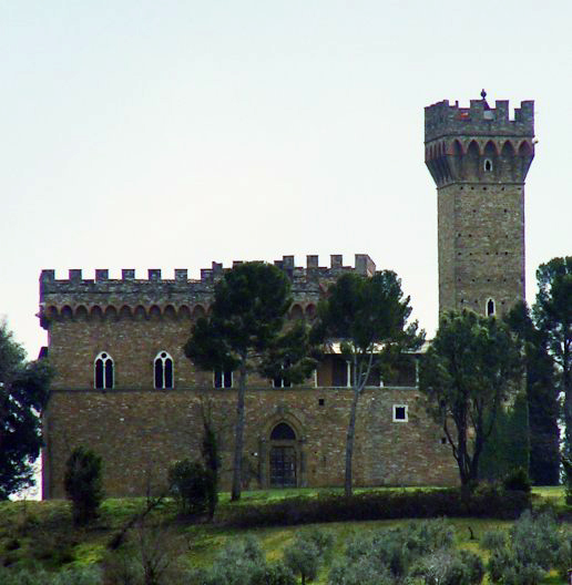 La Torre del Gallo ad Arcetri, vicino a Firenze. Foto del marzo 2005 di Bob Tubbs. da :en:Image:Arcetri torre de gallo.jpg